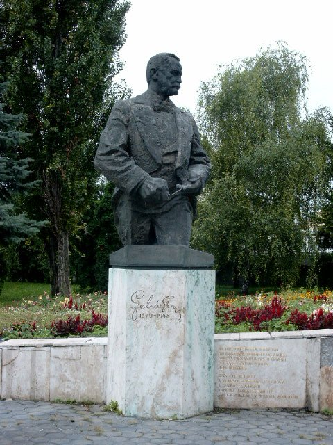 Monumento de Lehár Ferenc en lia naskiĝurbo Komárno. Foto el 2004.